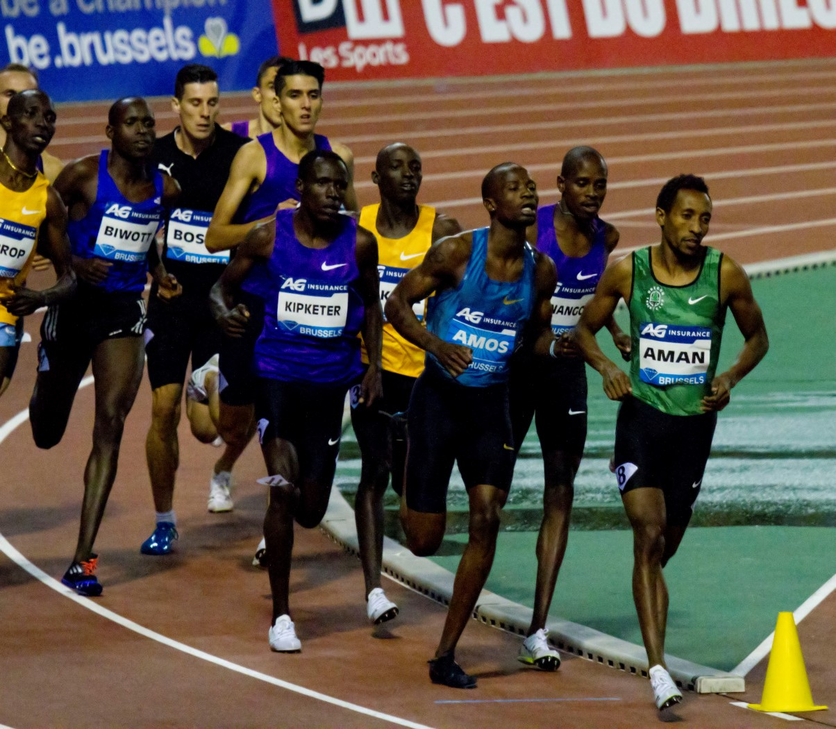 Men 800m during during 2015 Memorial Van Damme, Brussels